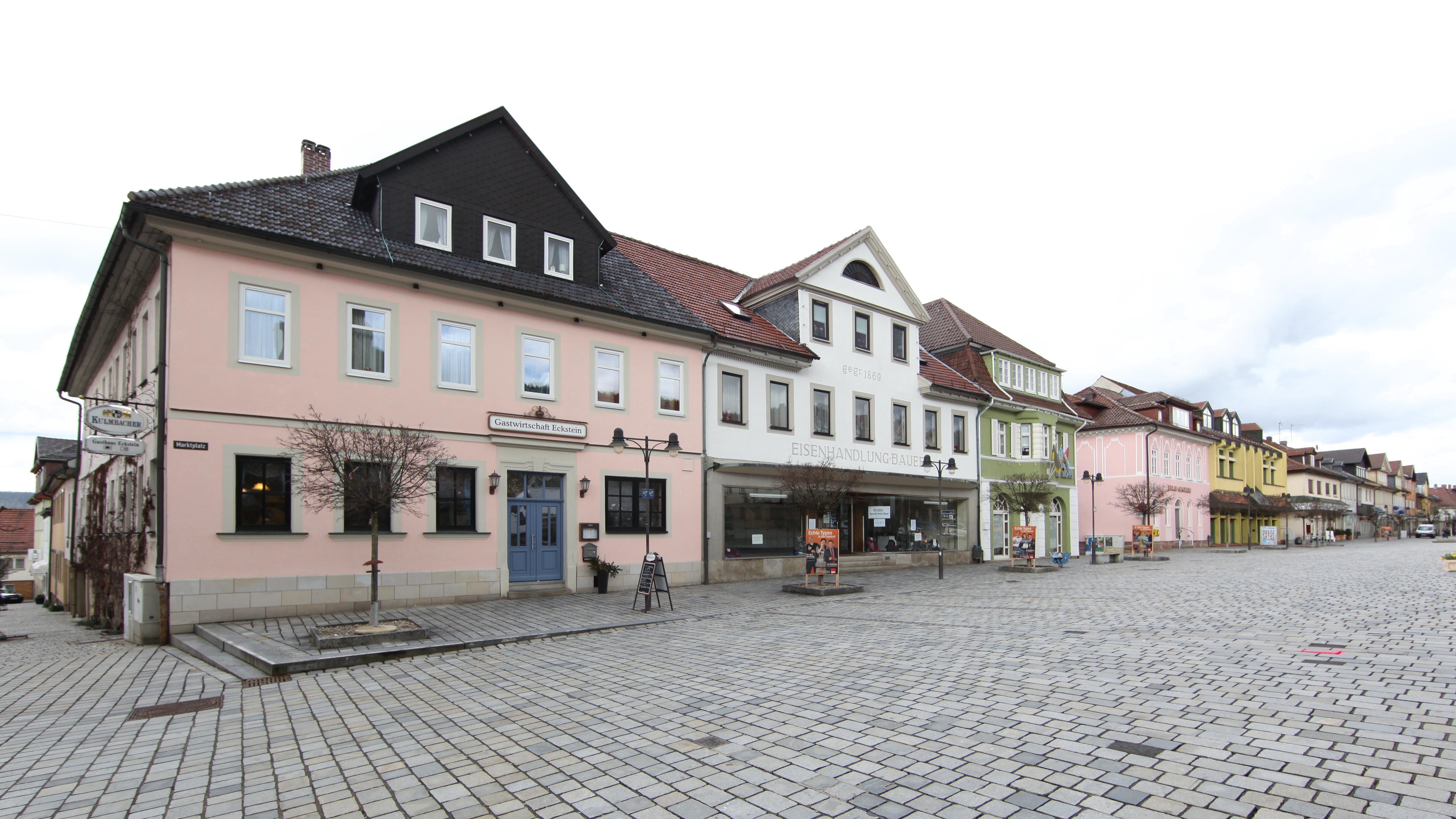 Neustadt bei Coburg, Marktplatz Nord-West-Seite